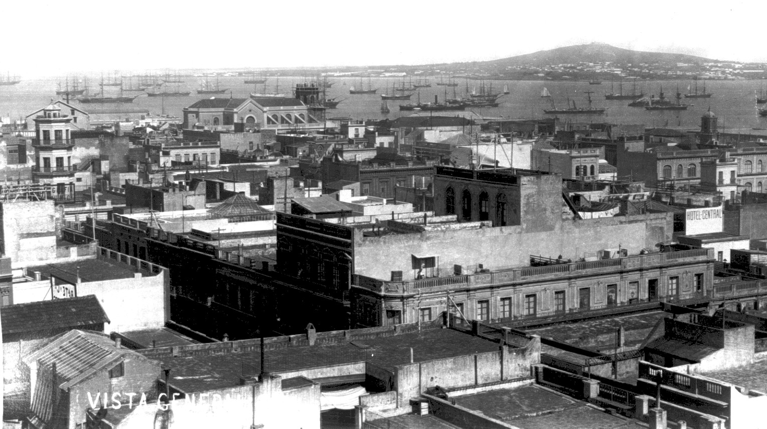 Vista del Cerro de Montevideo dede las azoteas en el año 1865